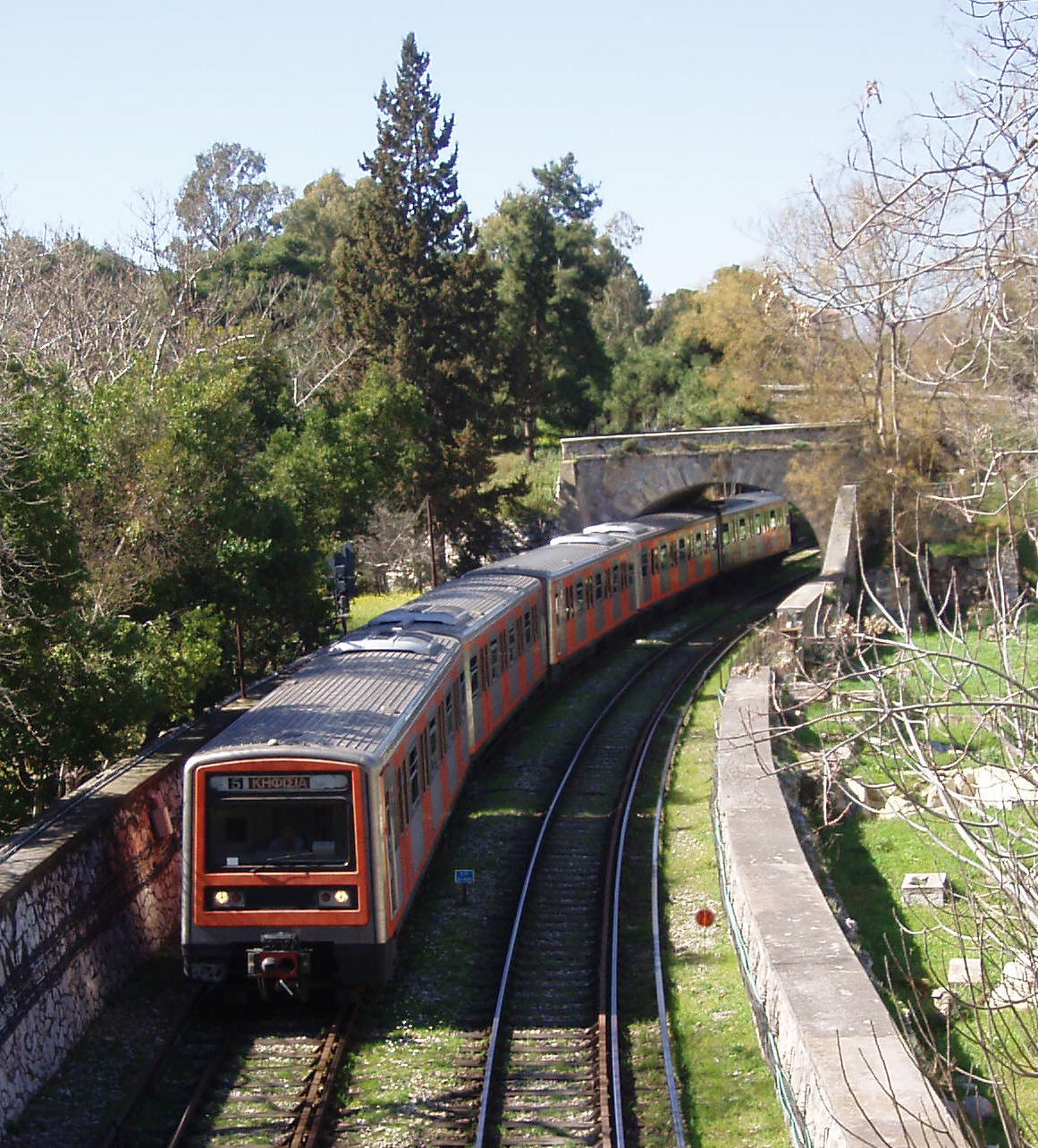 Athen, ISAP Zug nach Kifisia